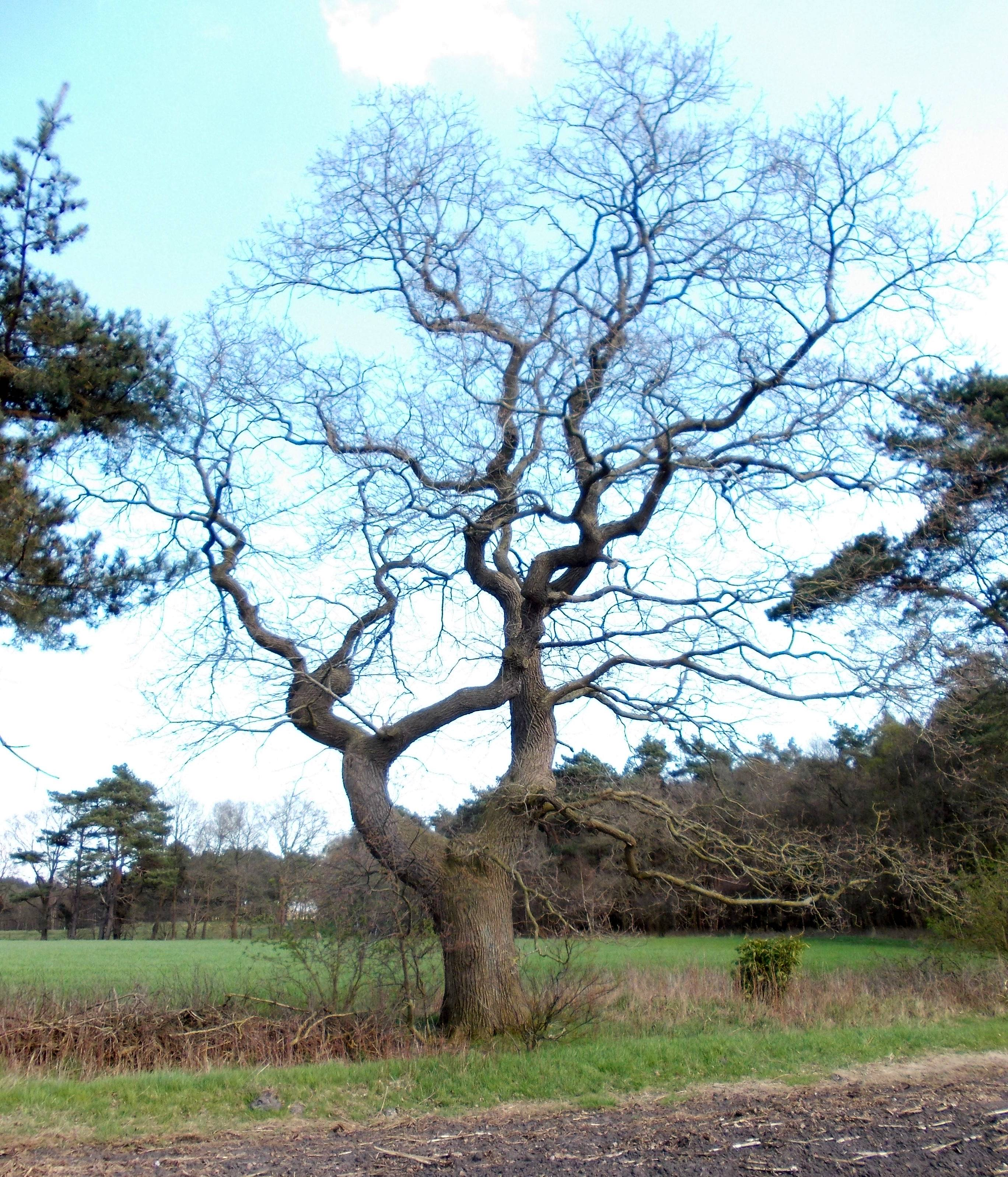 Pesteiche in Hollen, Naturdenkmal im Landkreis Cuxhaven, Niedersachsen